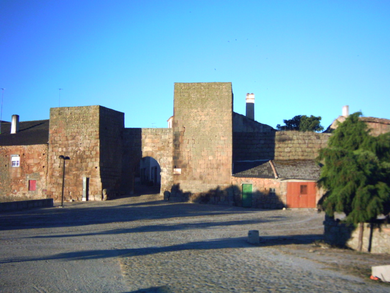 Castelo Mendo lors du mois d'août 2006.